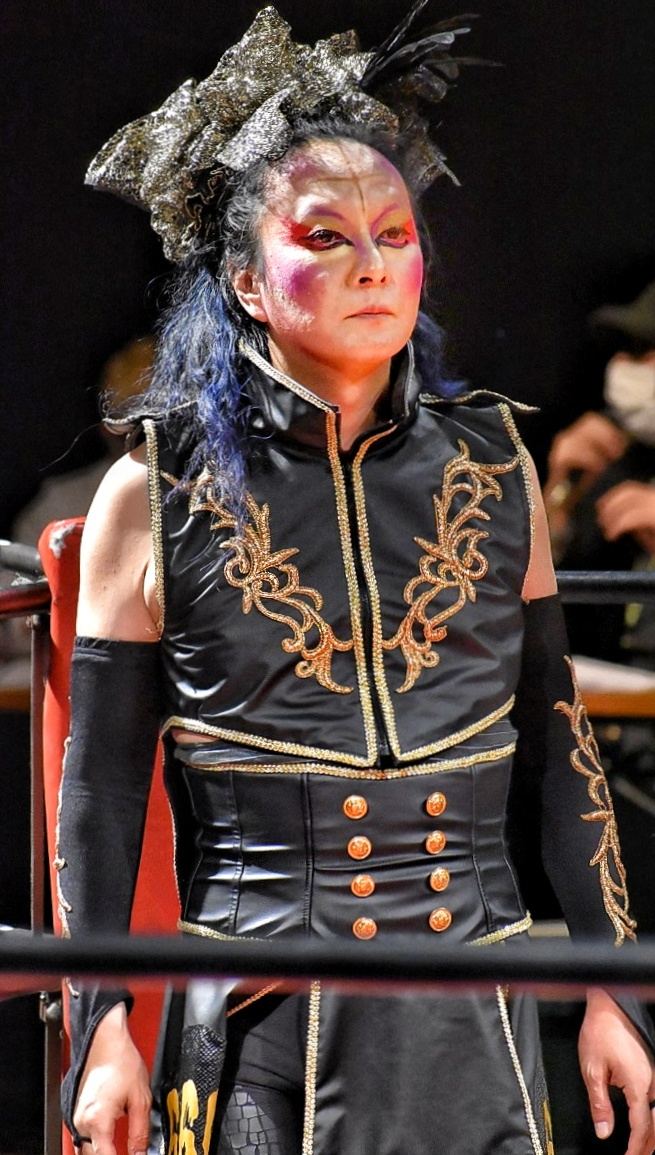 プロレスラーのモリノス